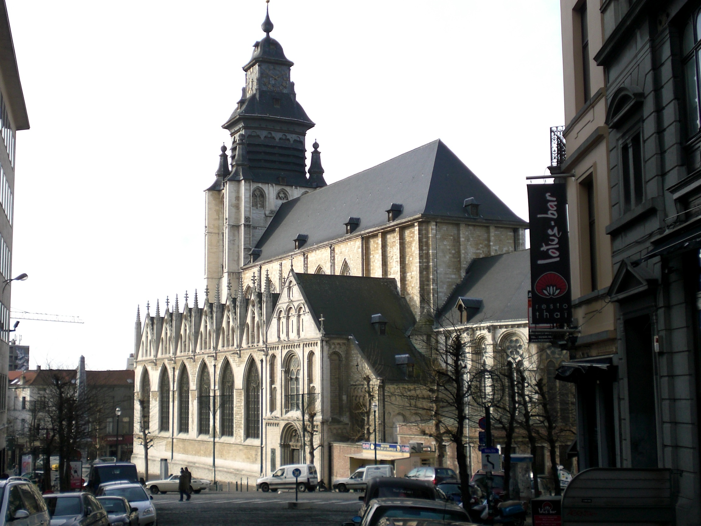 L'église Notre-Dame-de-la-Chapelle.